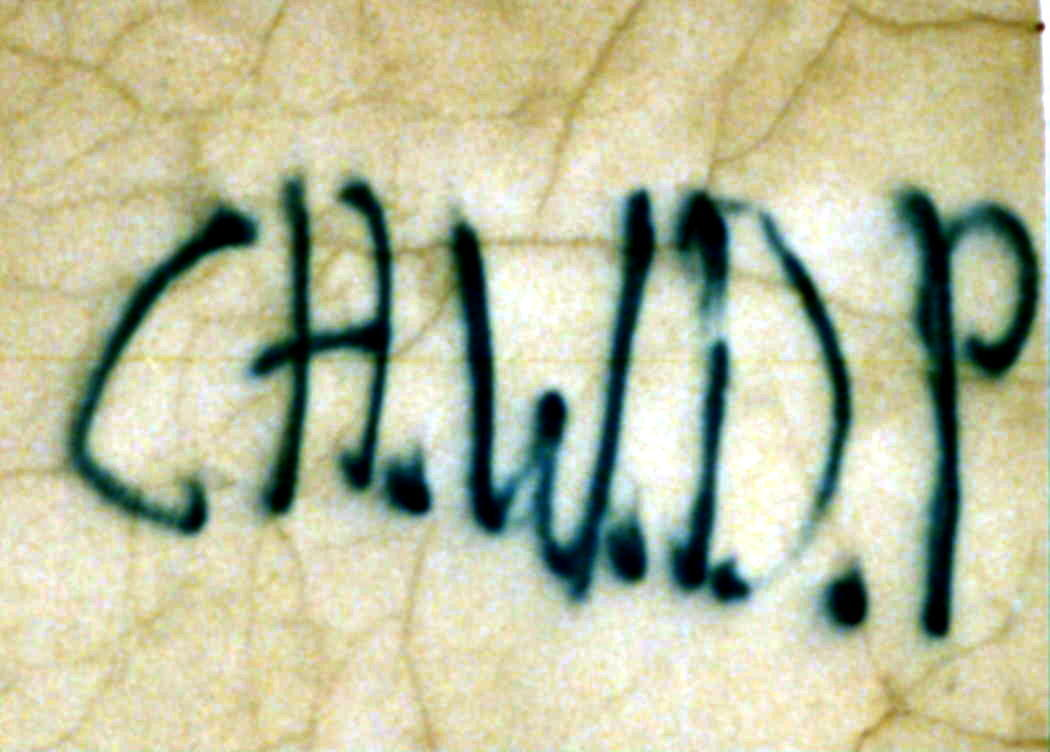 Graffiti wykonane na murze na jednym z bloków w śródmieściu w Częstochowie